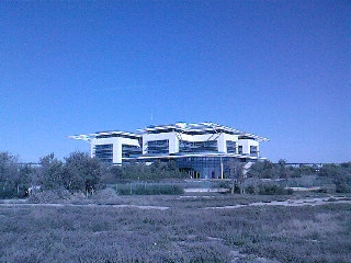 Le site du Conseil Général à La Rochelle, dans le quartier moderne des Minimes, vu depuis le rivage.